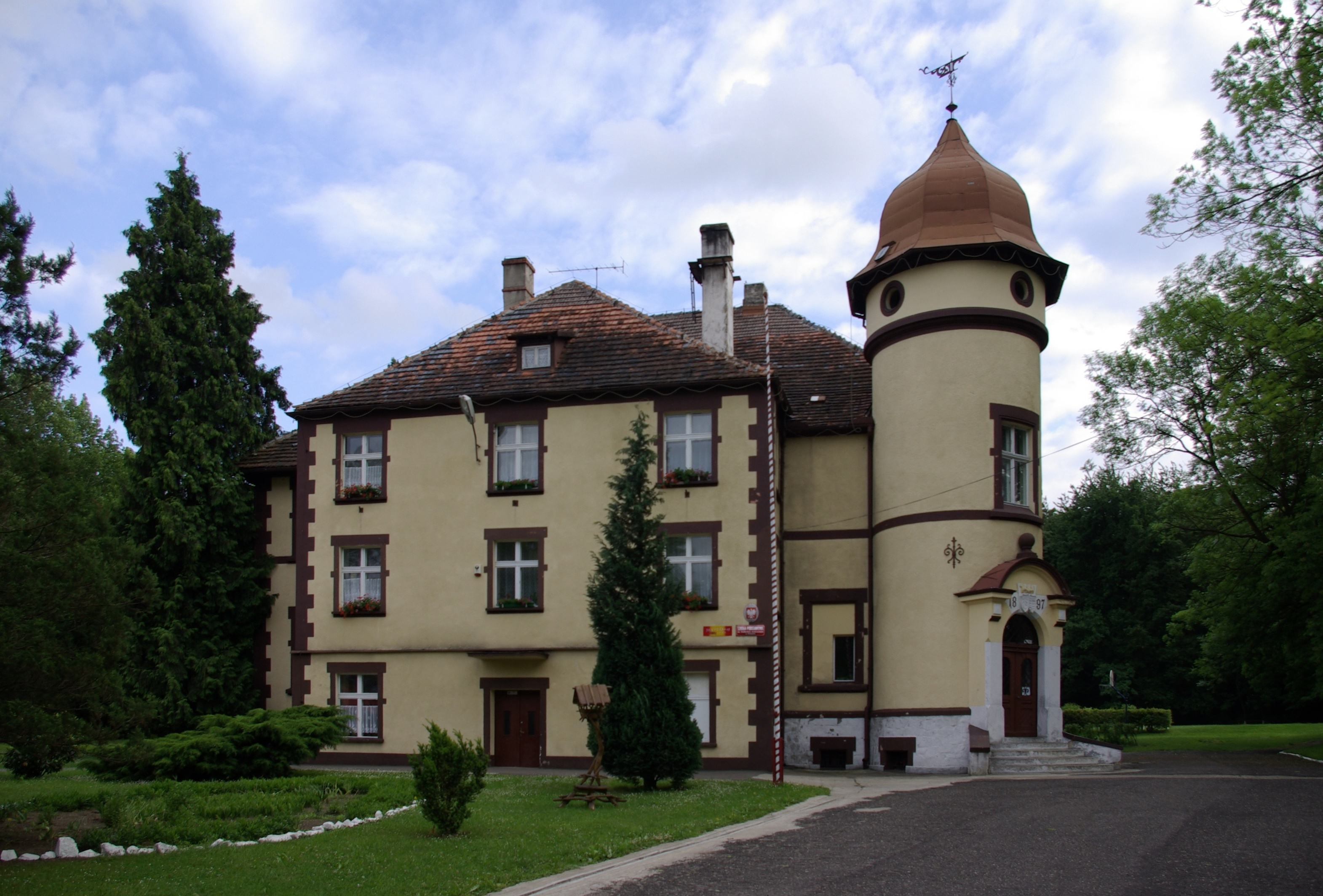 Rogi Zamek, województwo opolskie